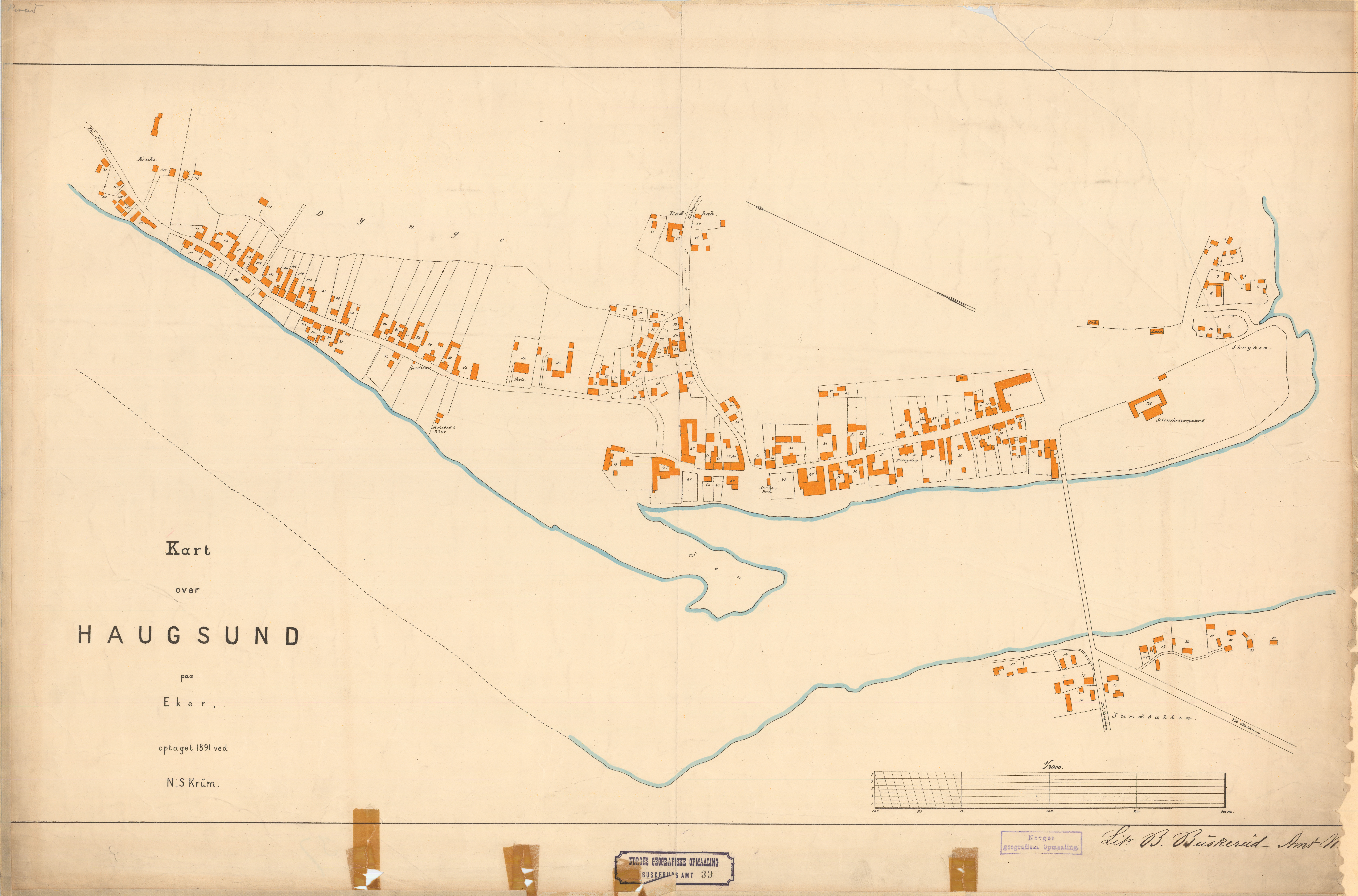 Kart over Lierstranda samt Eker. Lit.